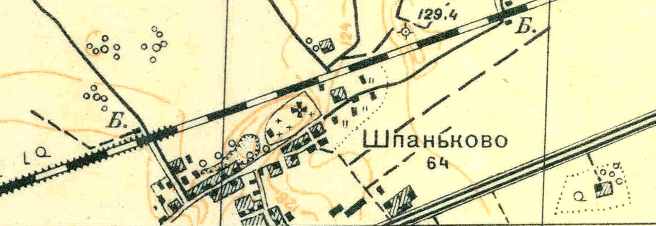 Топографическая карта Ленинградской области, квадрат О-35-24-Б-в (Вохоново), деревня Шпаньково